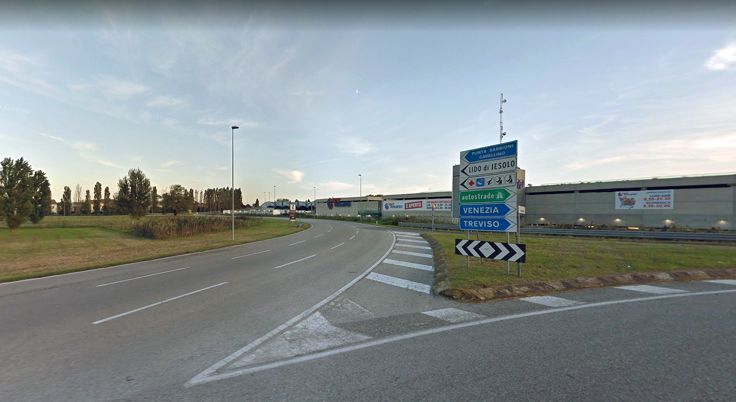 SR43 del Mare